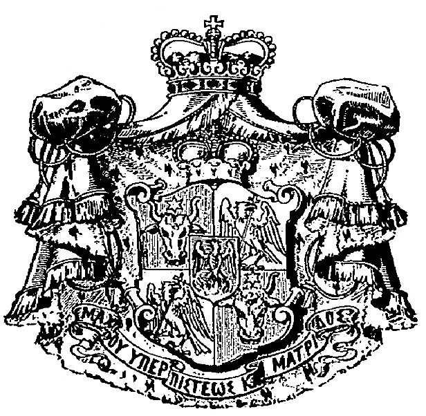 Wappen der Fürsten Ypsilanti.